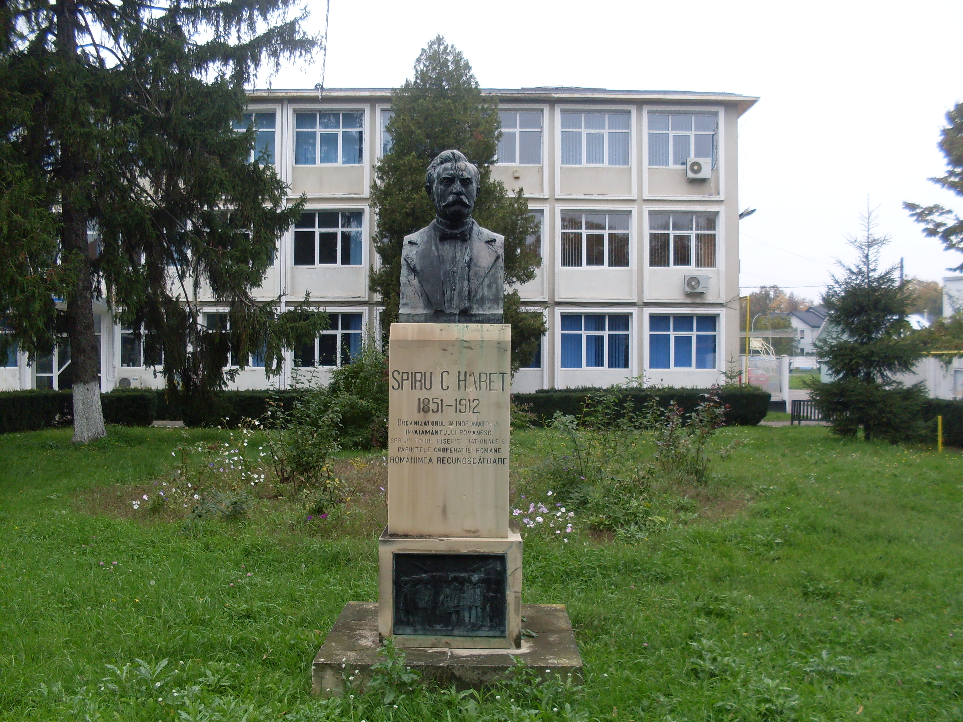 Bustul lui Spiru Haret